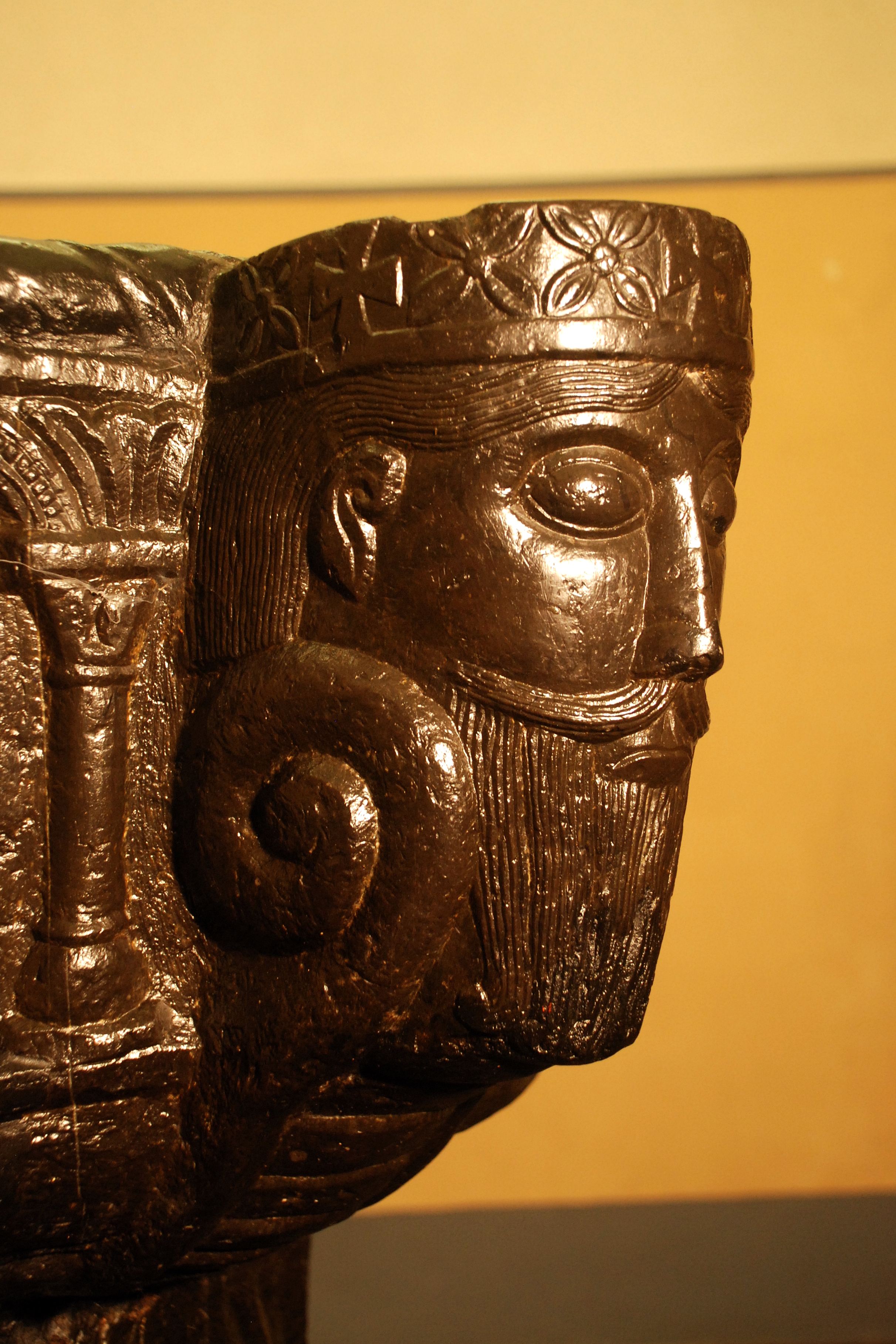 Belgique - Brabant wallon - Fonts baptismaux de Beauvechain